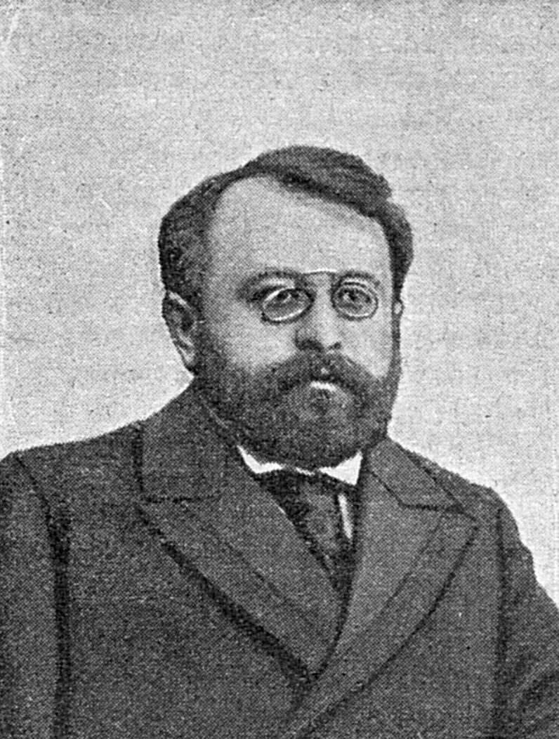 Гессен, Владимир Матвеевич